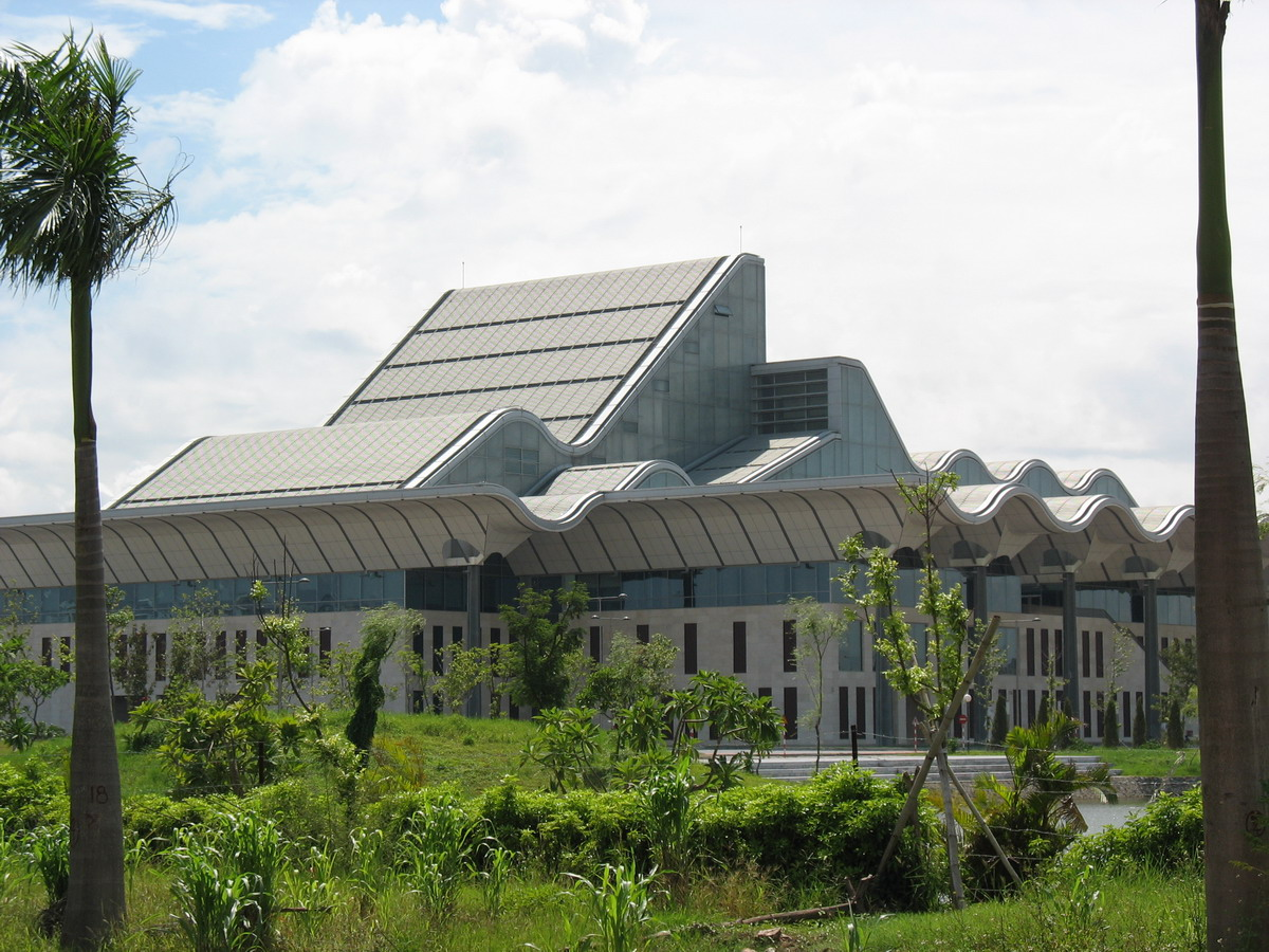 hình tự chụp